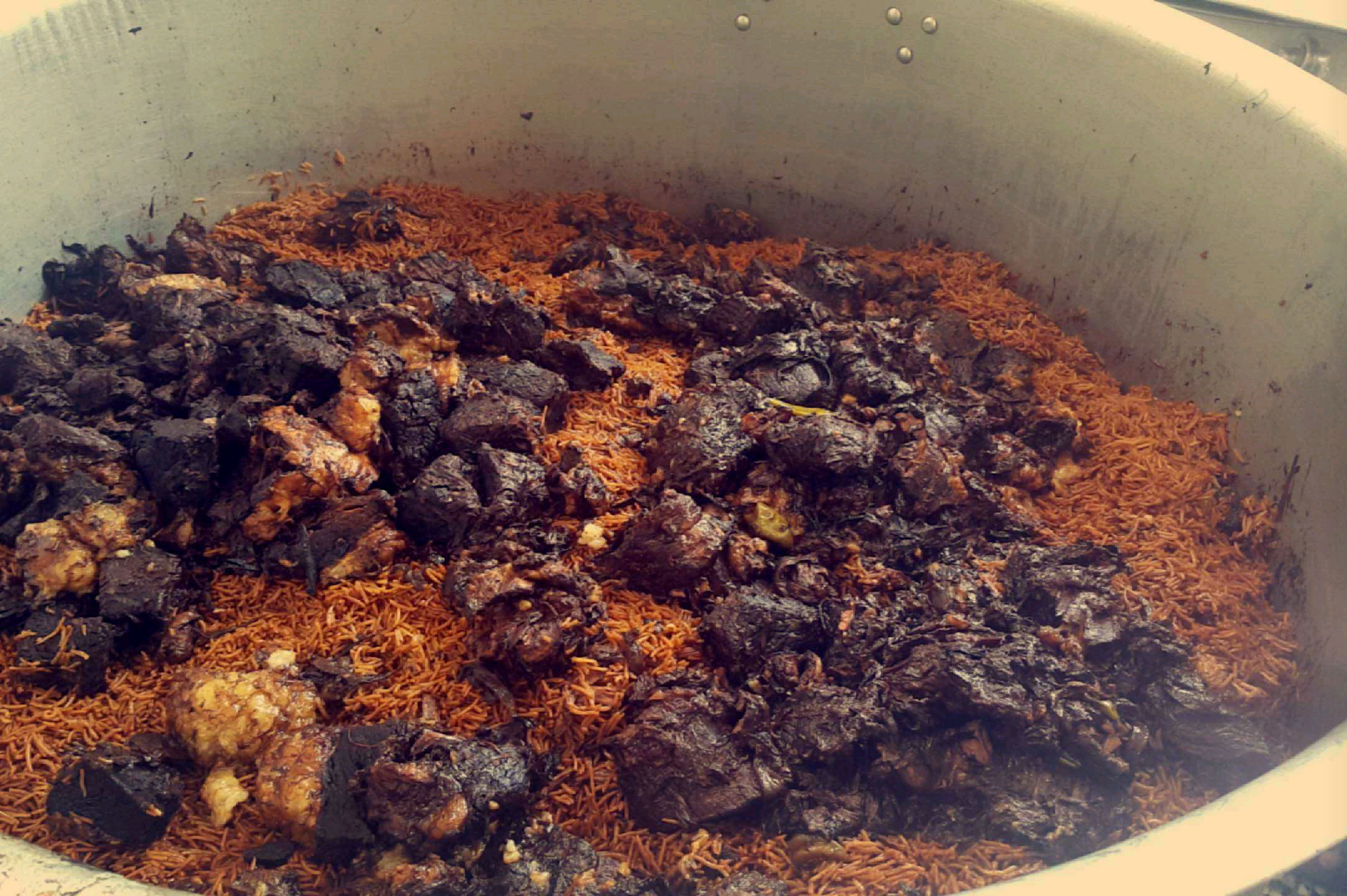 أثناء إعداد محموص اللحم بمأتم أم حسين التاروتي إدغامية